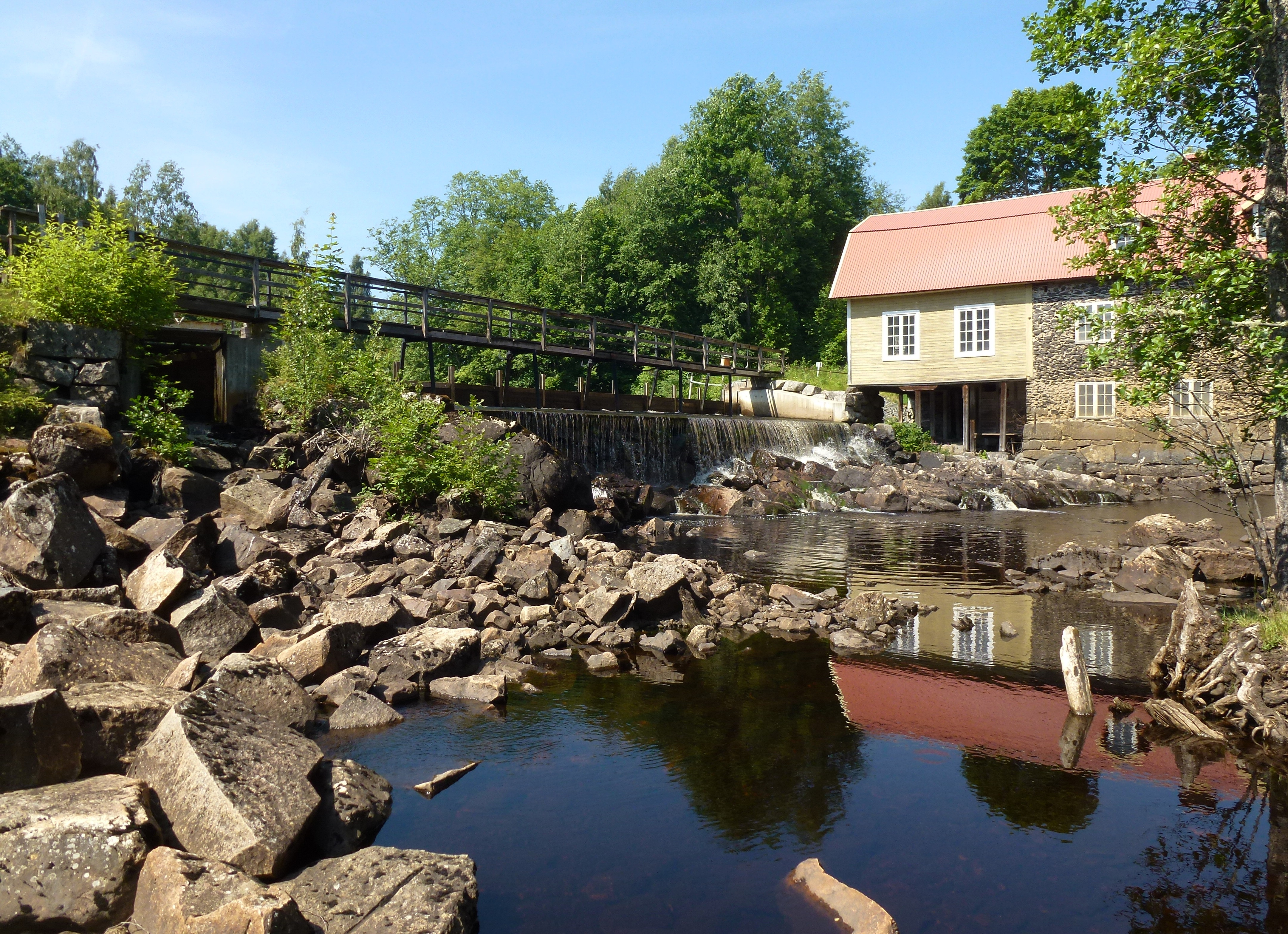 Sunnansjö hytt- och hammarområde